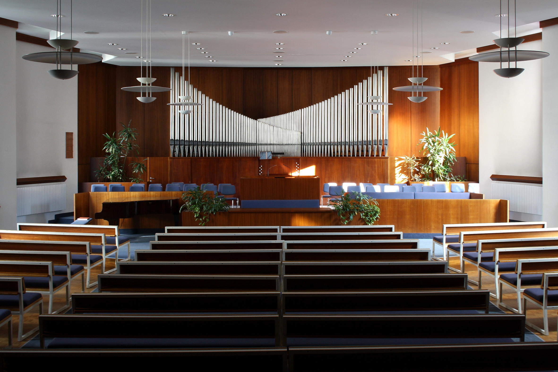 Innenansicht des Gemeindehauses der Kirche Jesu Christi der Heiligen der Letzten Tage in der Böcklinstraße 55 im 2. Wiener Gemeindebezirk Leopoldstadt.